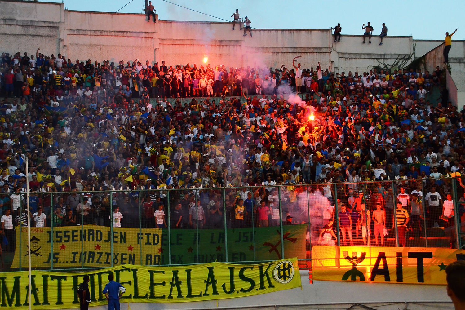 Supporters de la JS Kabylie lors d'un match de Ligue 1 contre l'USM Alger au stade du 1er-Novembre-1954 de Tizi Ouzou le 23 août 2014.